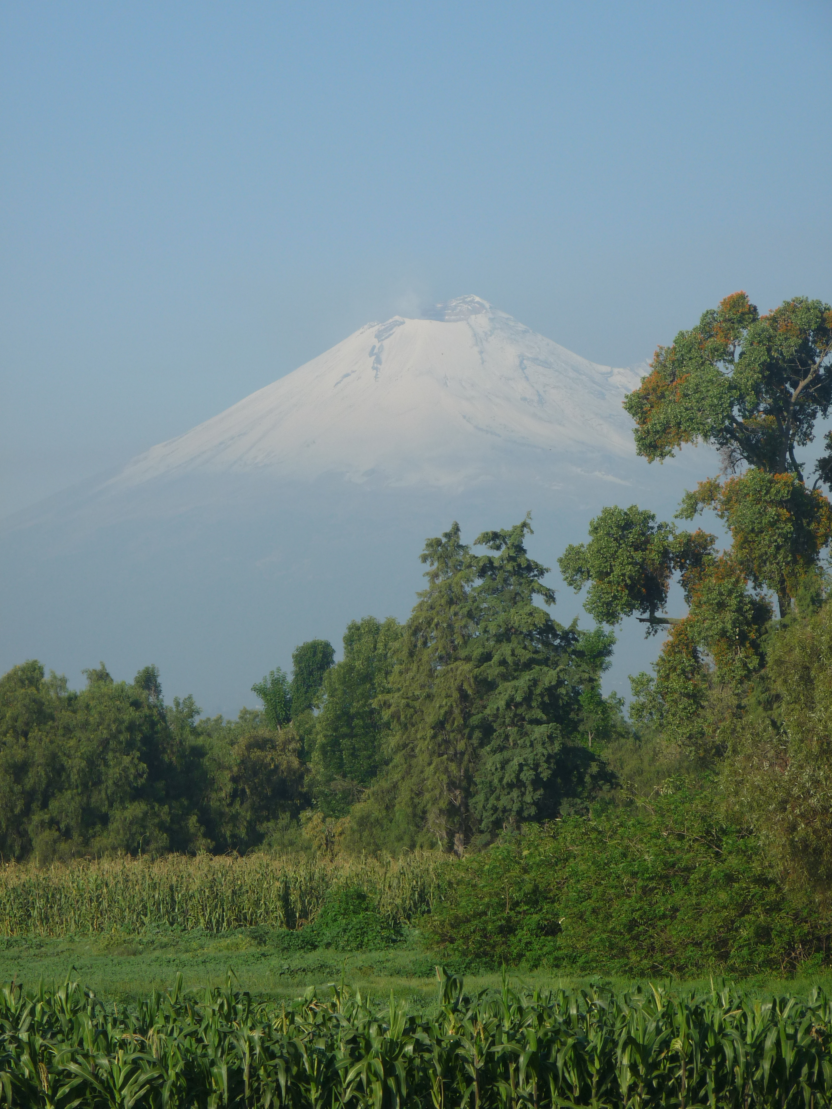 Volcán Popocatépetl (México)